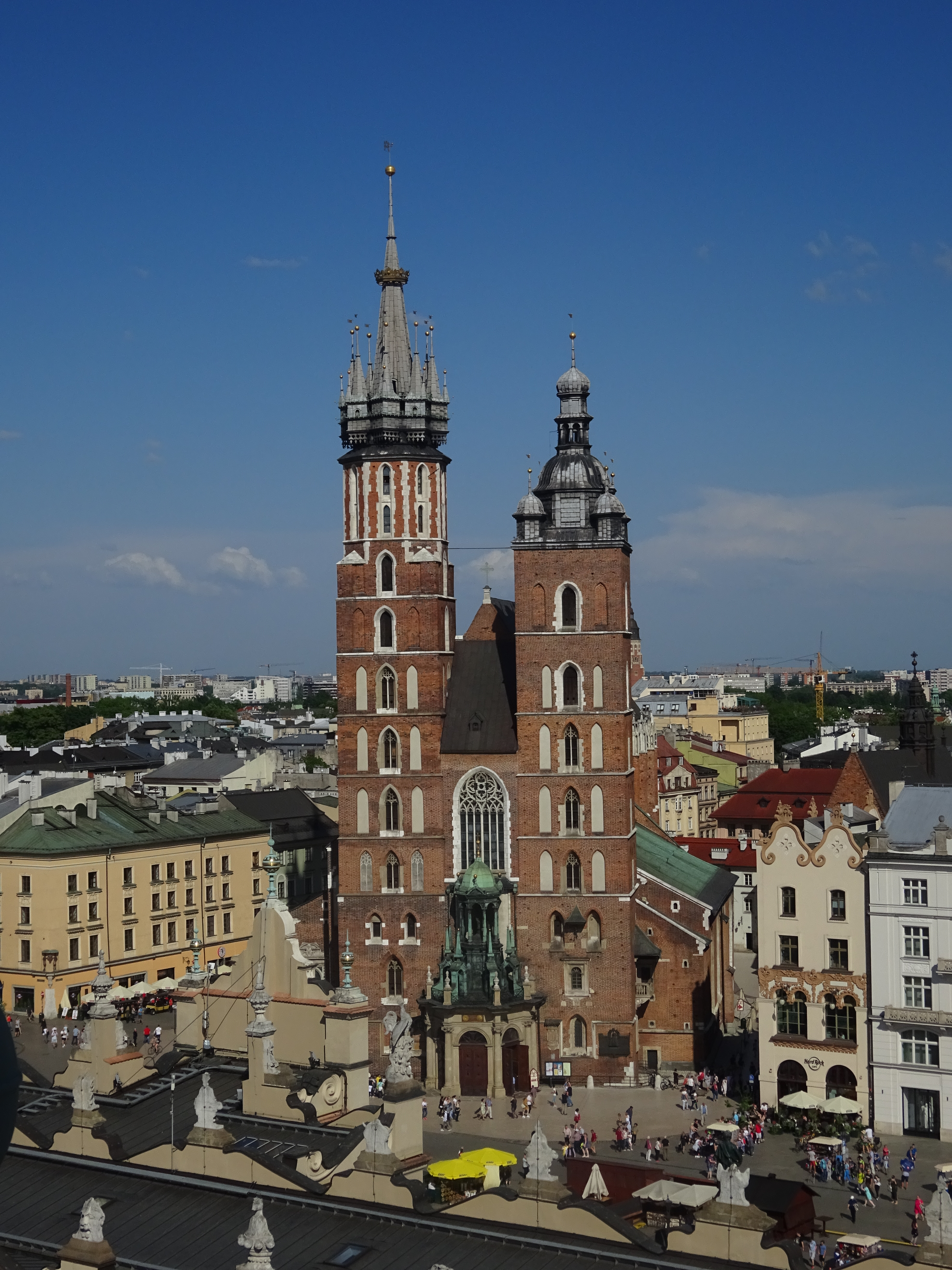 Kościół Mariacki w Krakowie - widok z Wieży Ratuszowej. 2018